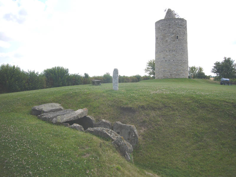 Gesamtanlage Eichstädter Warte